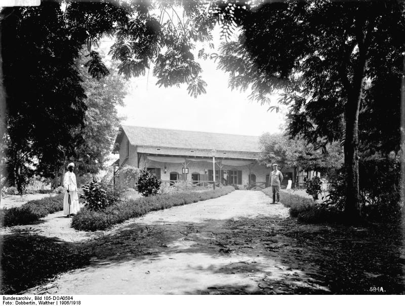 Bezirksnebenstelle Muhesa, Parkbild